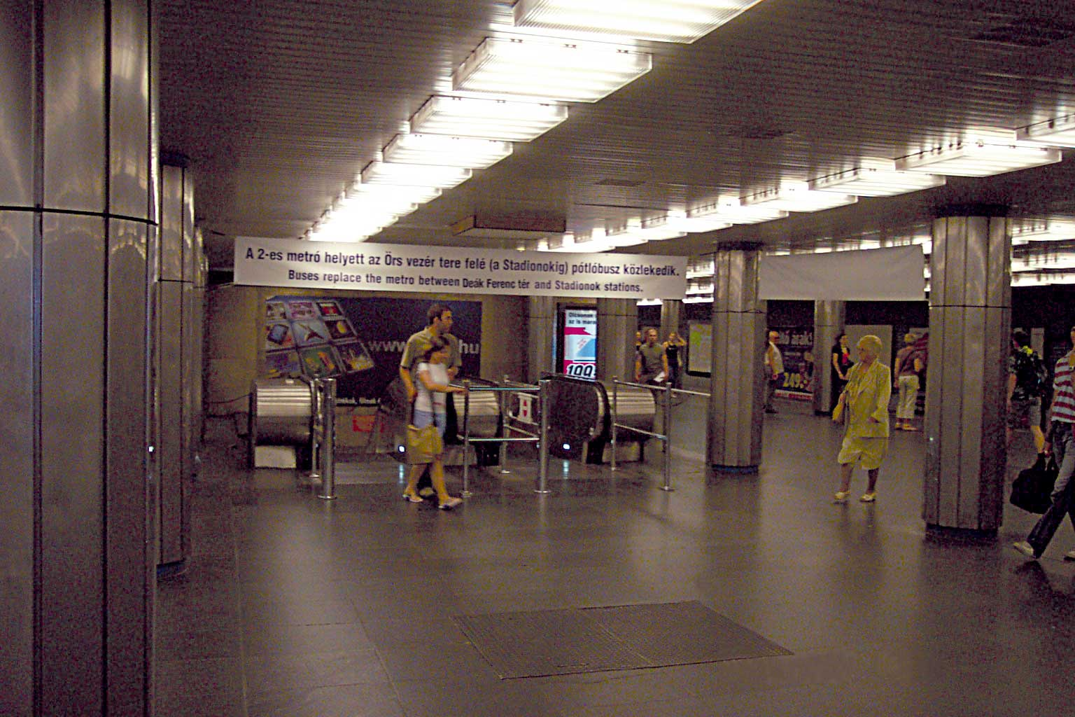 Budapest U-Bahn-Station von M3 Deák tér